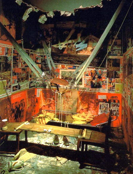 "Человек, который улетел в космос из своей комнаты", 1986